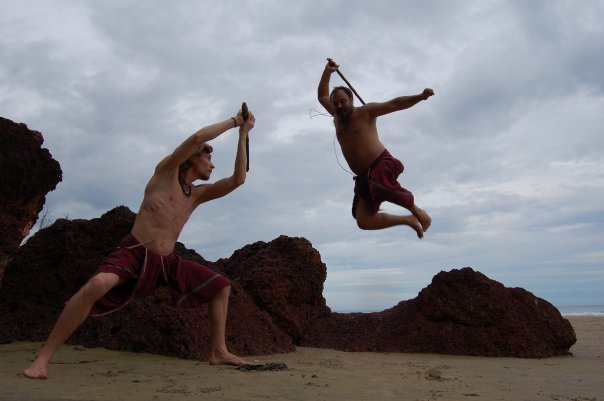 Walka z użyciem tradycyjnej drewnianej broni.